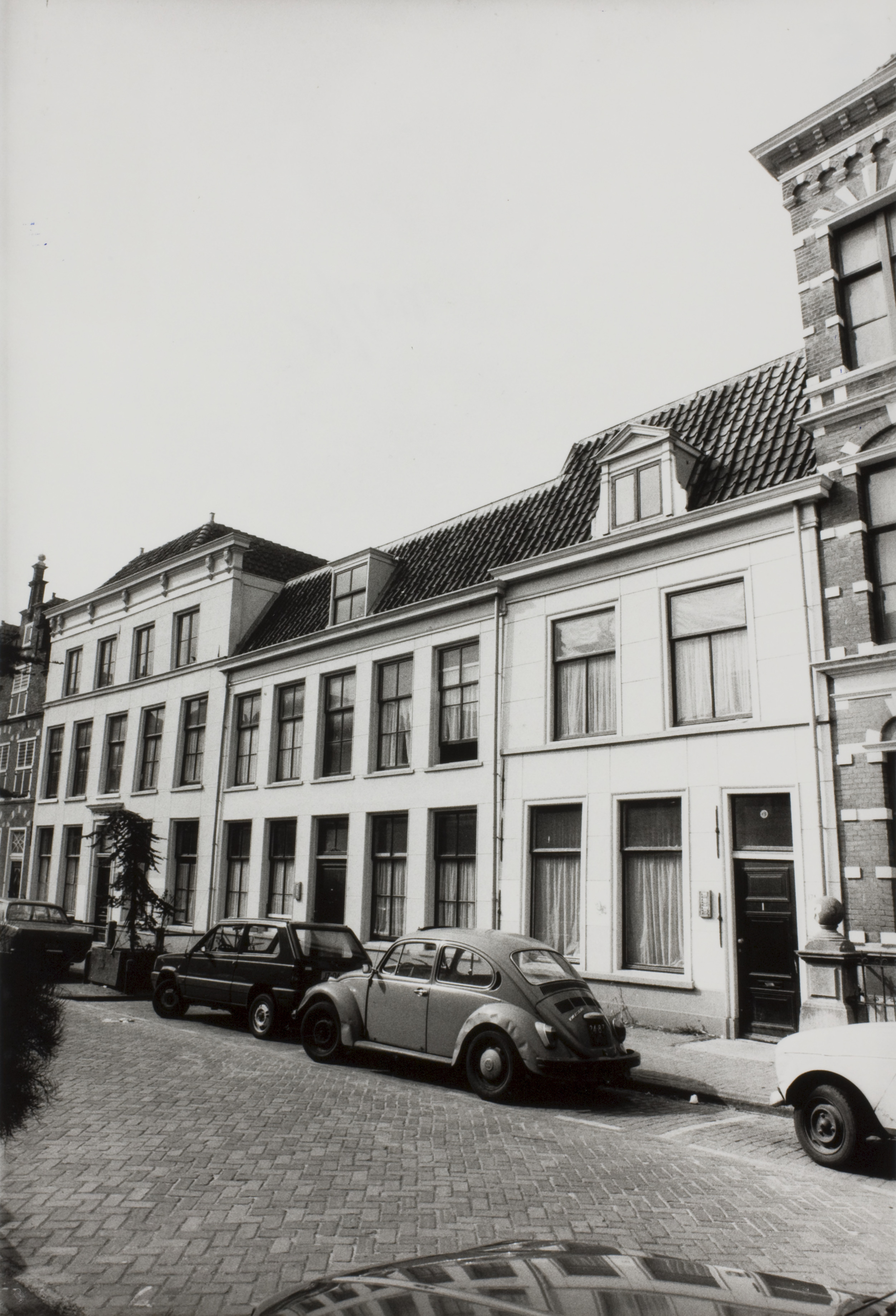 Voorgevels studentenhuis 'De Witte Raaf'. Voormalige Papengracht 17, 17a en 19. Thans tezamen Papengracht 17.